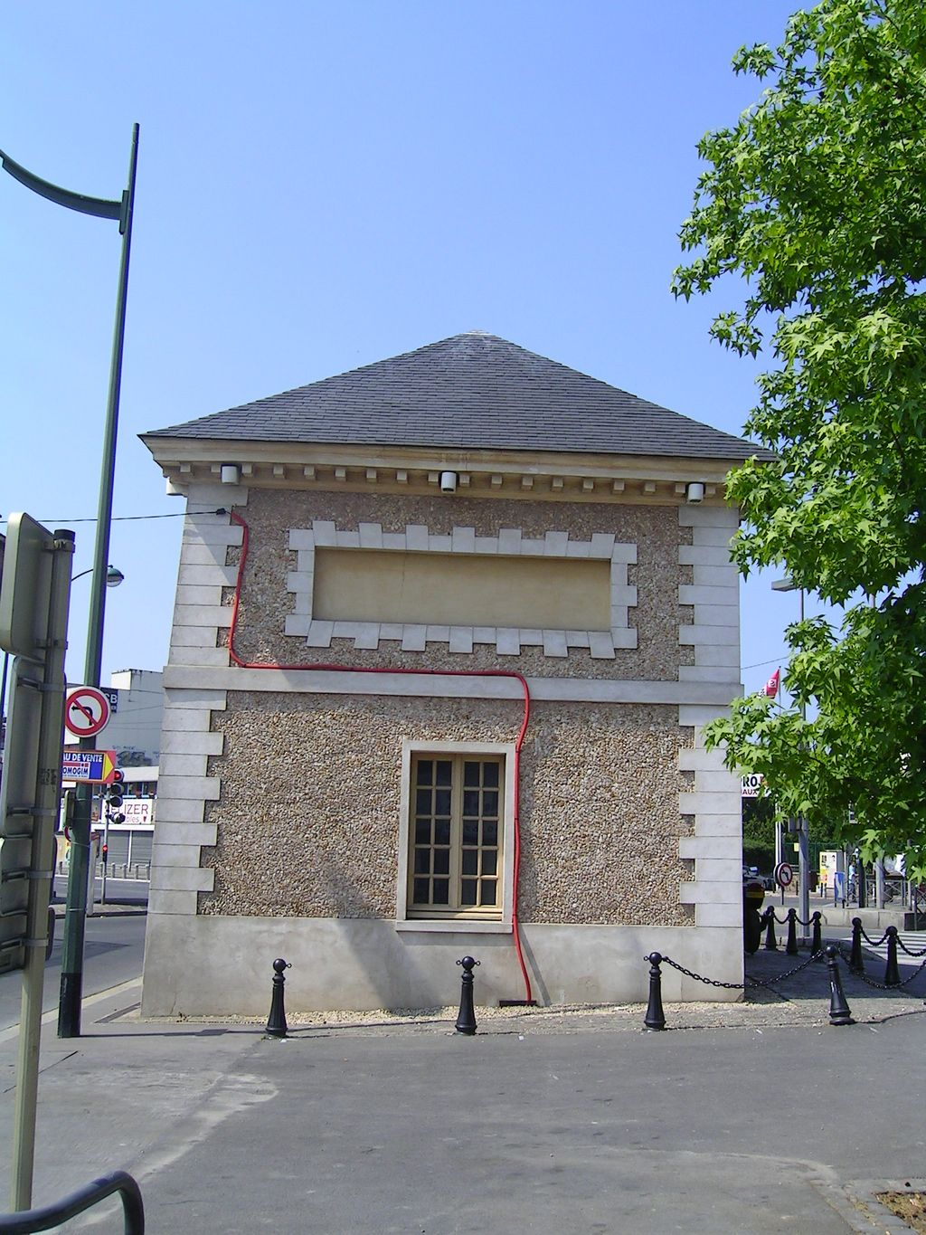 Pavillon d'entrée de l'ancien domaine du Raincy Photo personnelle (own work) de Marianna